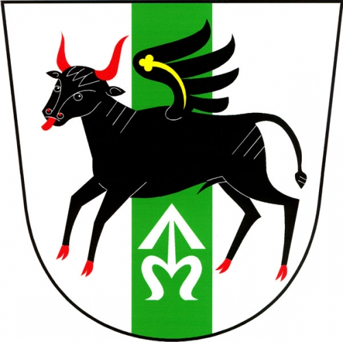 znak, Ocmanice, okres Třebíč